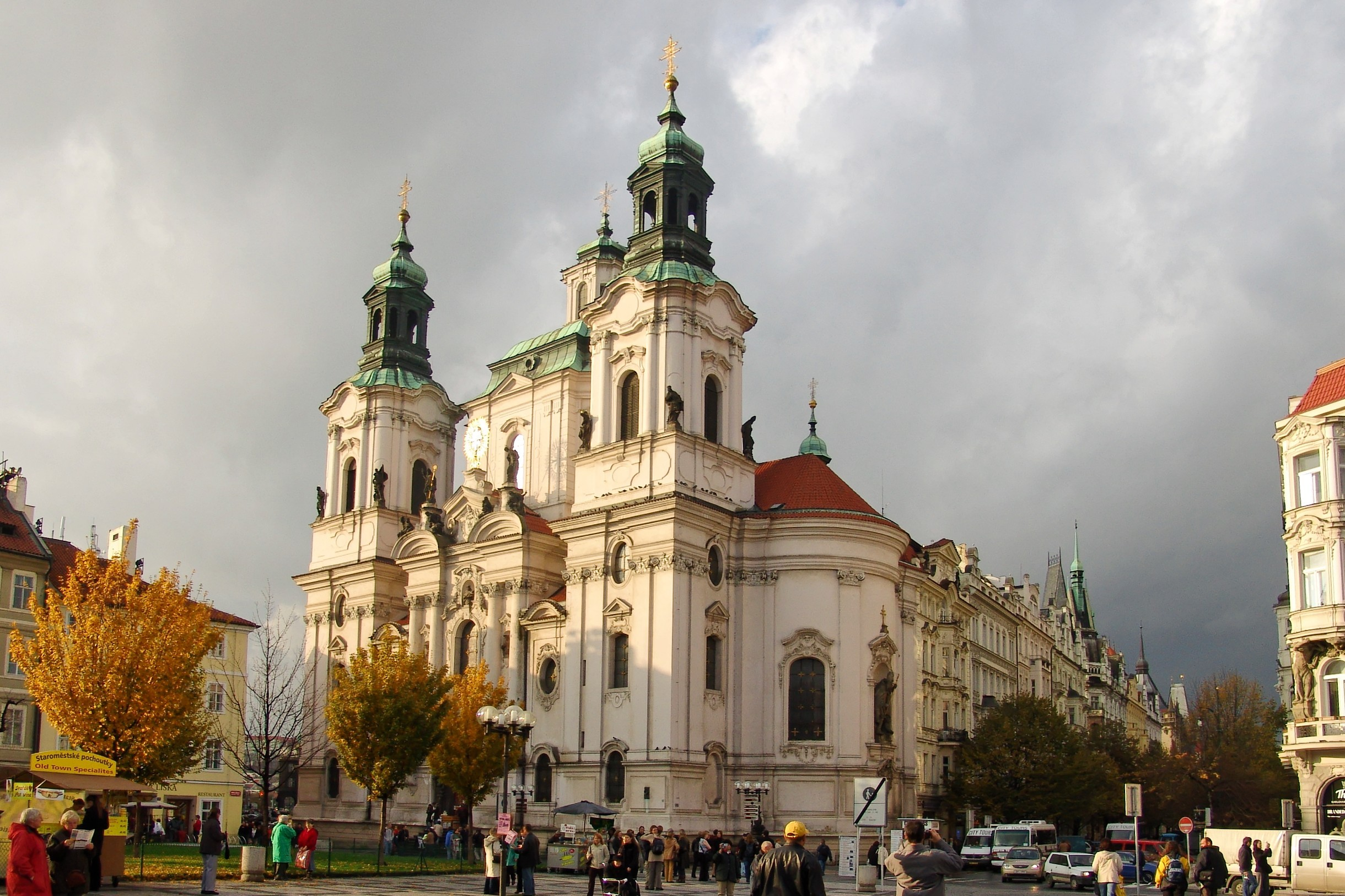 Un magnifque bâtiment à Prague .